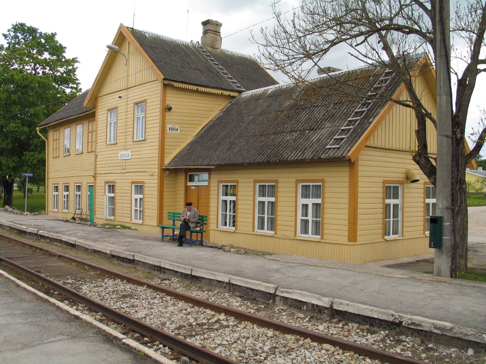 Kohila vana jaamahoone